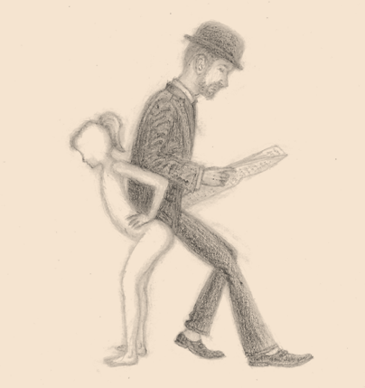 Meuble humain, human furniture, forniphilie, forniphilia.